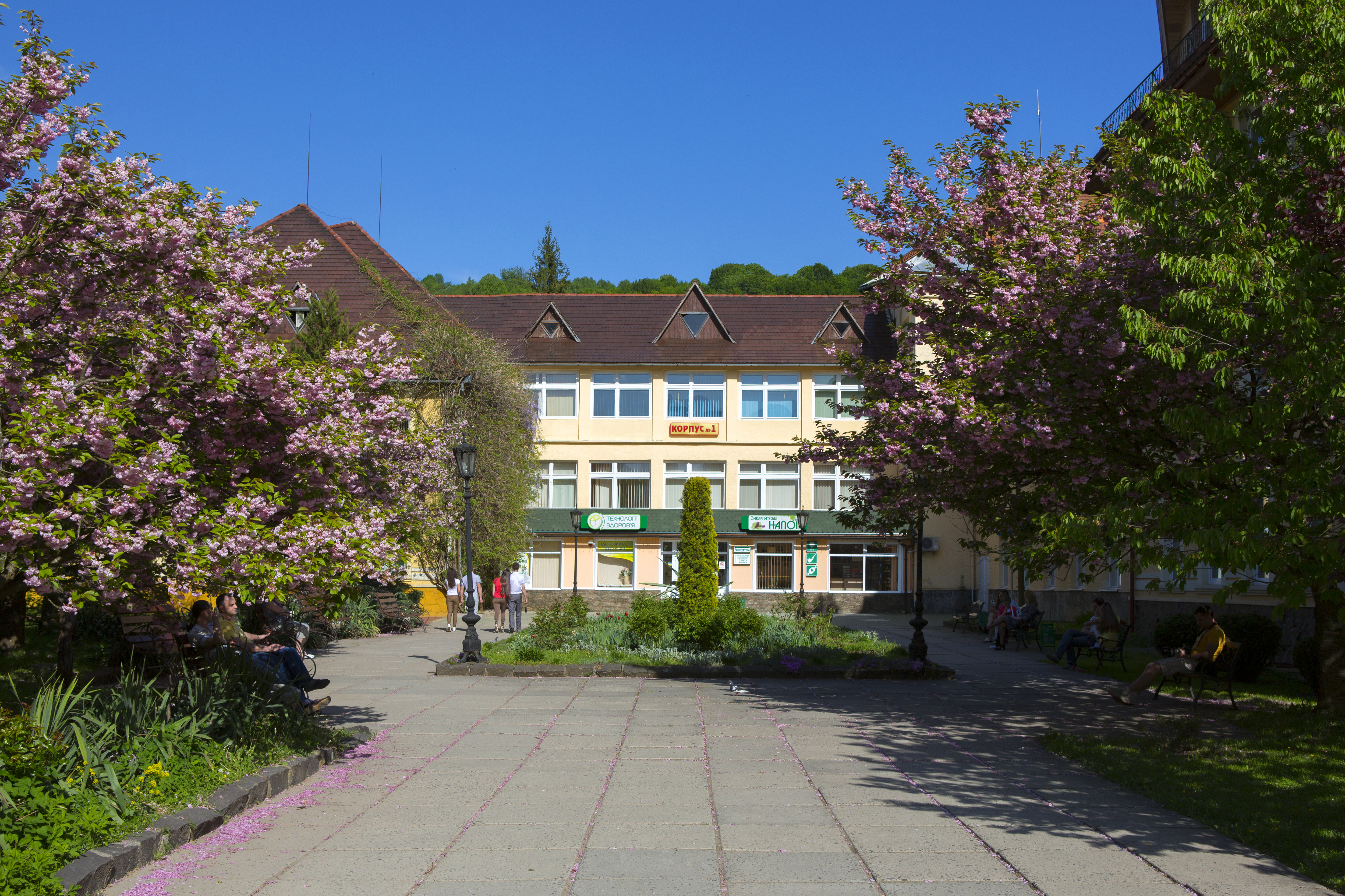 Корпус санатория, где находится регистрация отдыхающих.